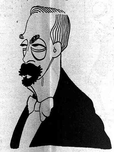 El Gay Saber. Galería cómica dels Mestres vius.